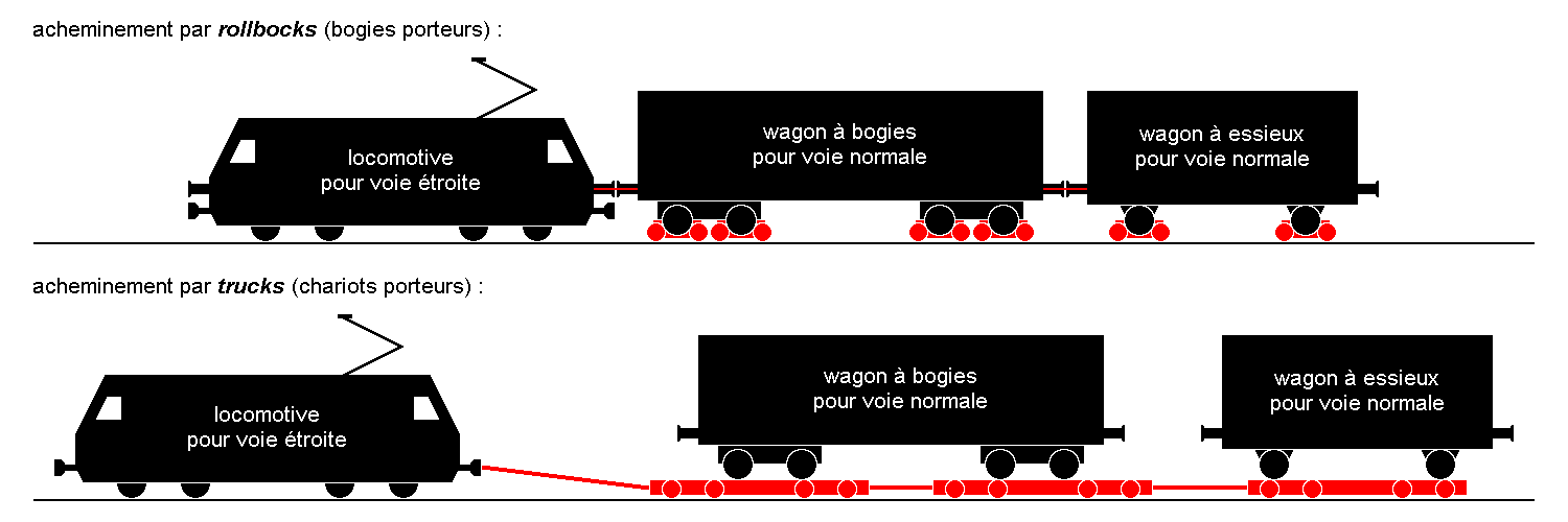 Méthodes d'acheminement de wagons à voie normale sur des réseaux à voies étroites